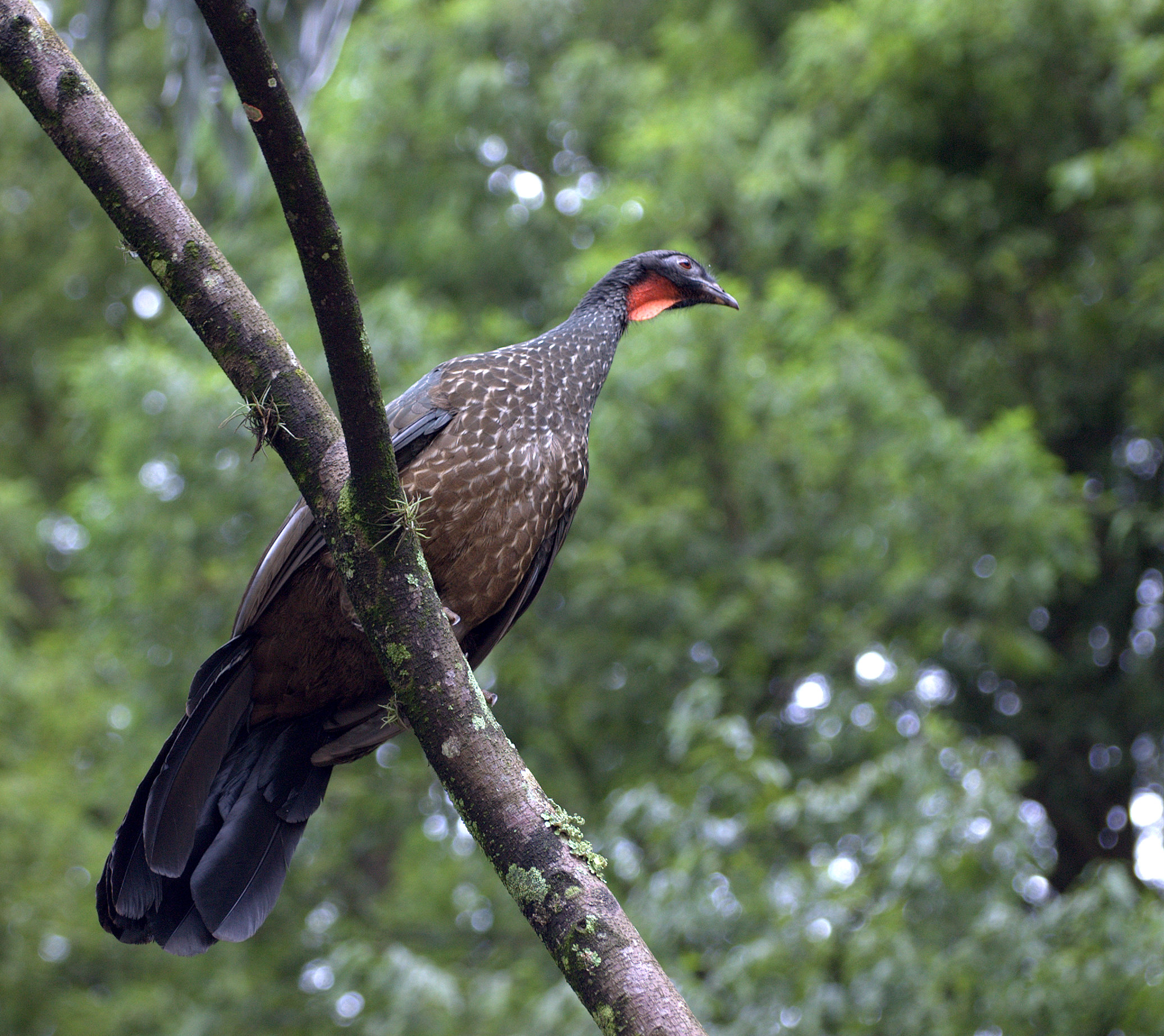 Horto Florestal de São Paulo